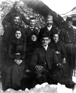 Ангелос Сакелариу